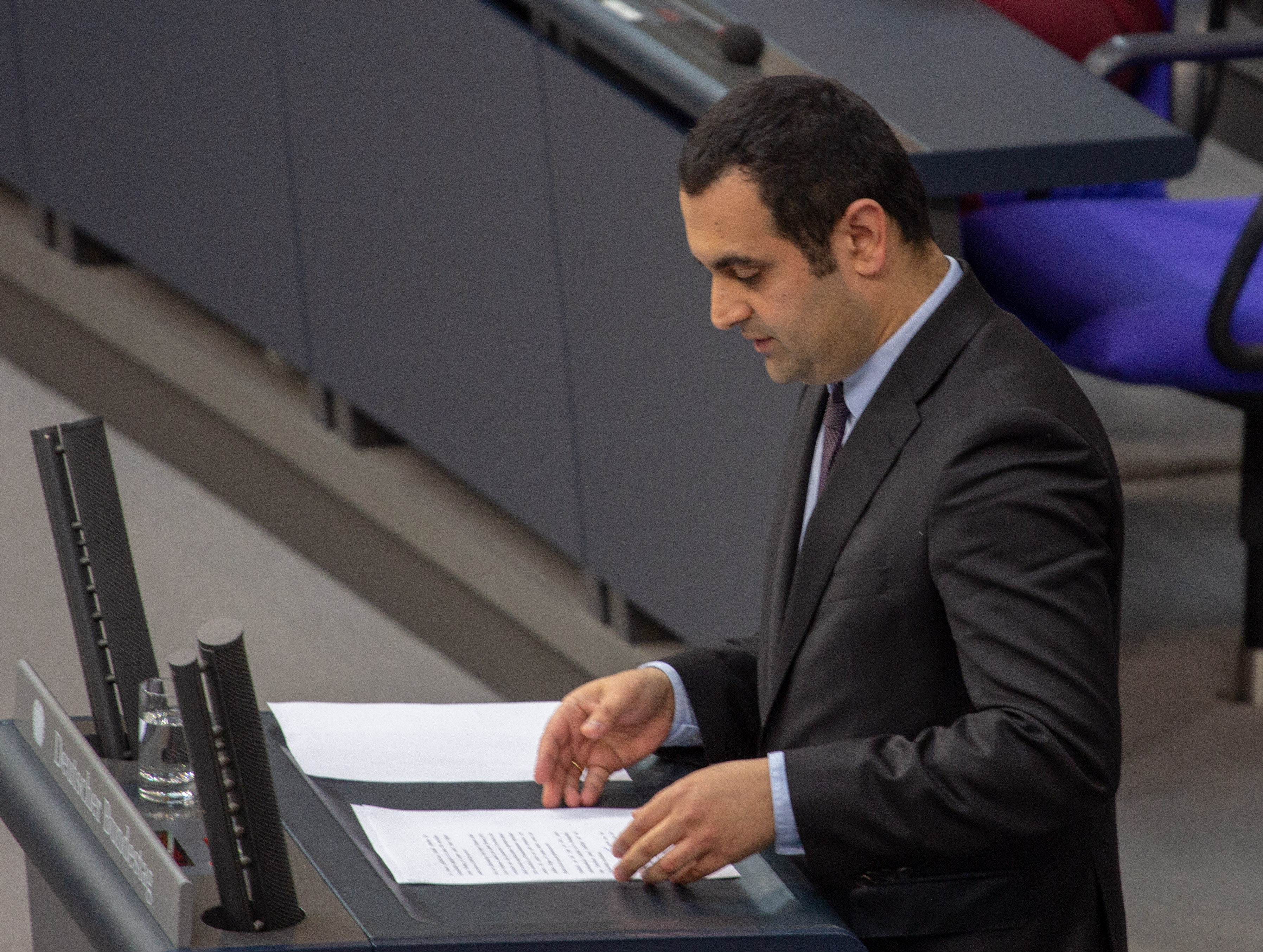 Bijan Djir-Sarai, Mitglied des Deutschen Bundestages, während einer Plenarsitzung am 11. April 2019 in Berlin.